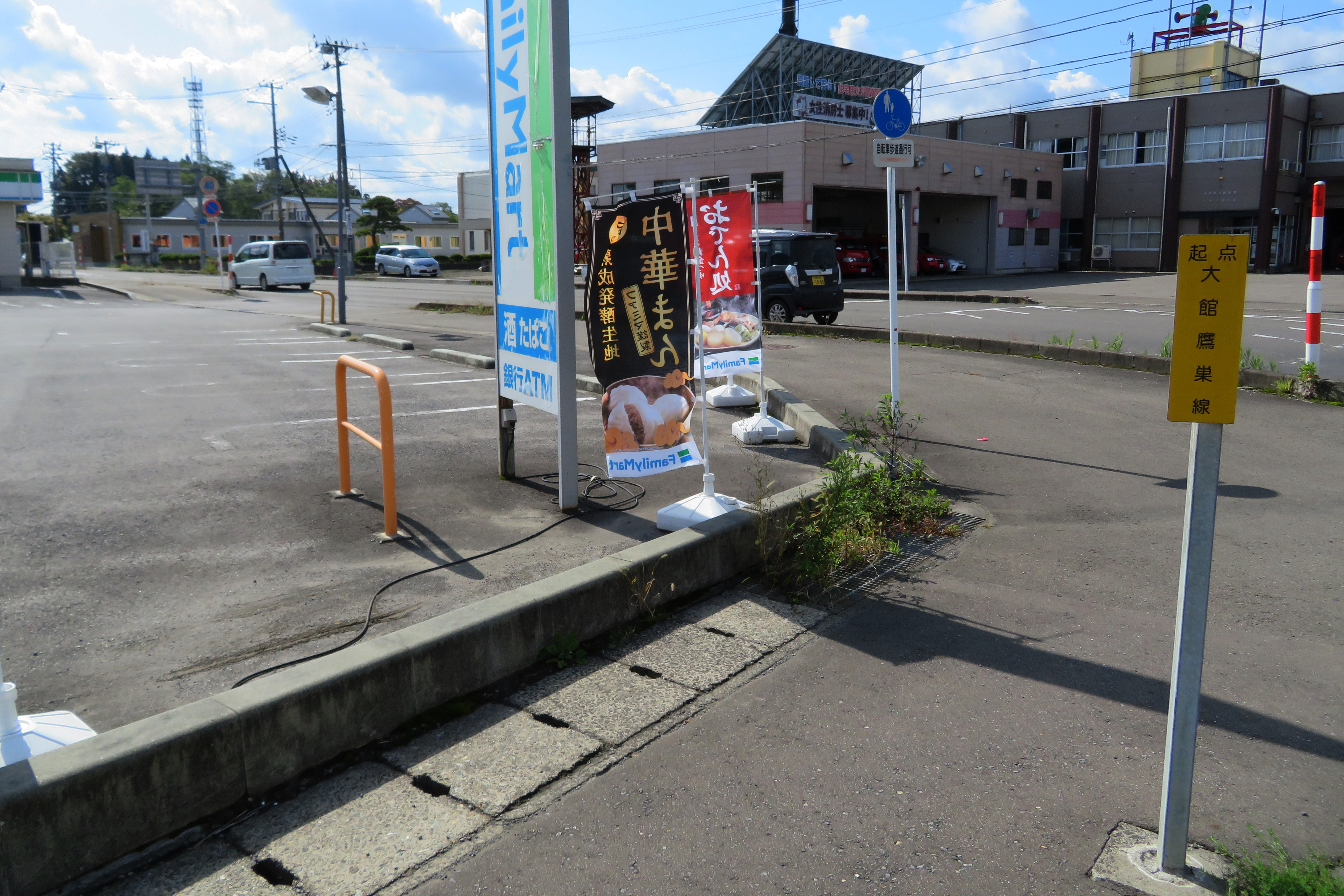 秋田県道102号大館鷹巣線の起点：秋田県大館市住吉町3 Canon PowerShot SX720 HS